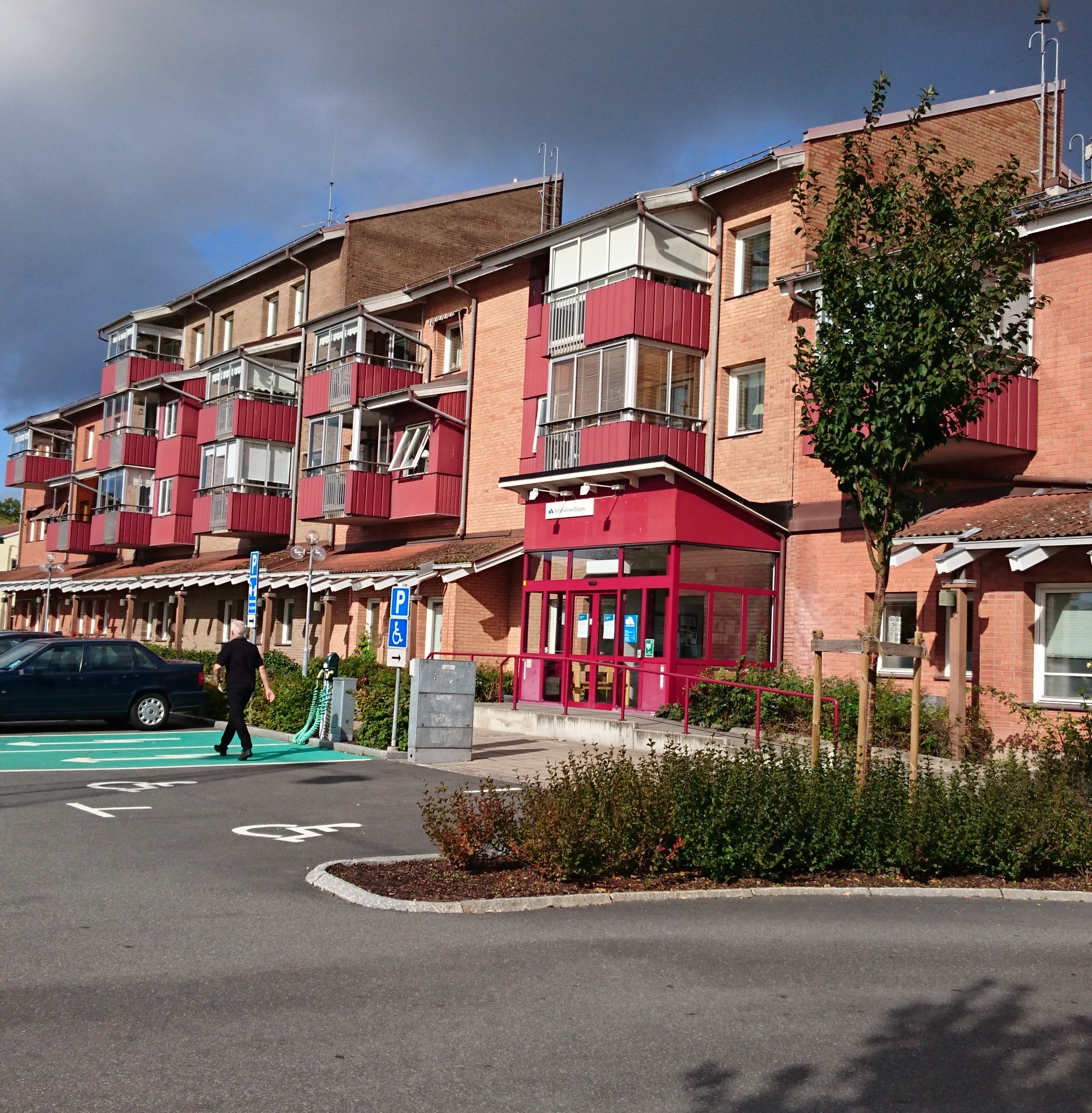 Kvarteret Ernst i Ronneby fotograferat 2017.